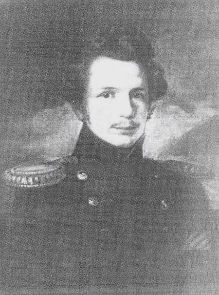 Paul Theodor von Krusenstern, russischer Polarforscher (1809-1881)